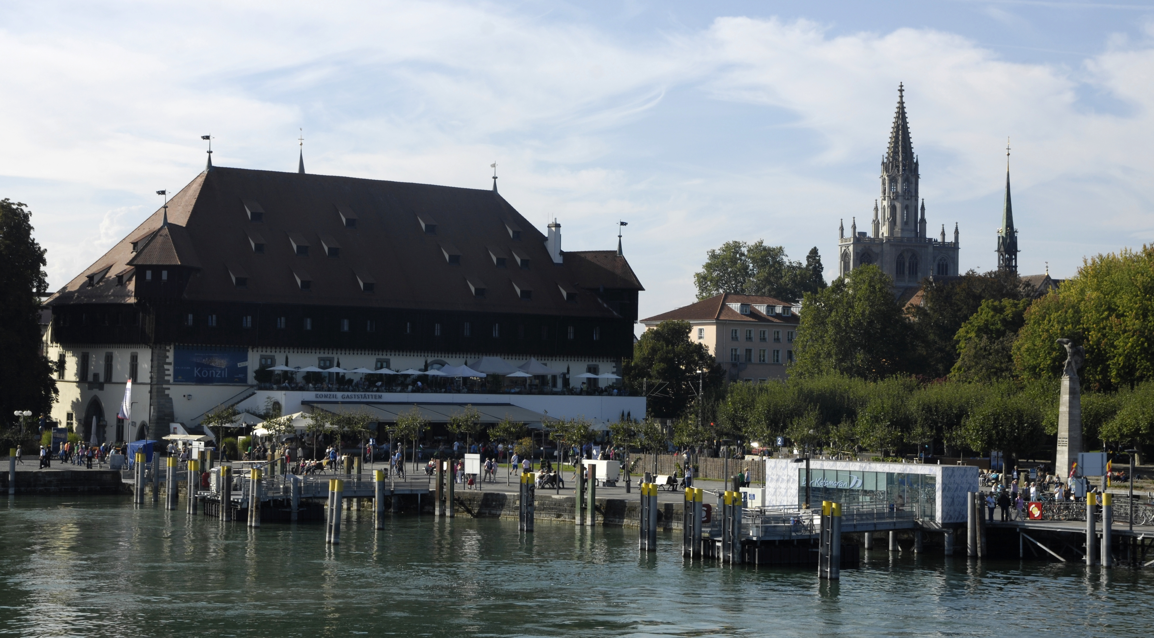 Blick vom Boot zurück auf den Hafen von Konstanz mit dem Konzil